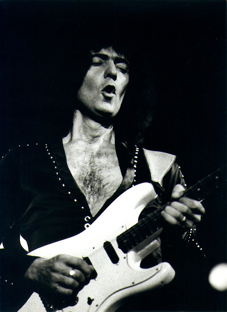 Ritchie Blackmore actuando en la Plaza de Toros Monumental de Barcelona durante su etapa con Rainbow.